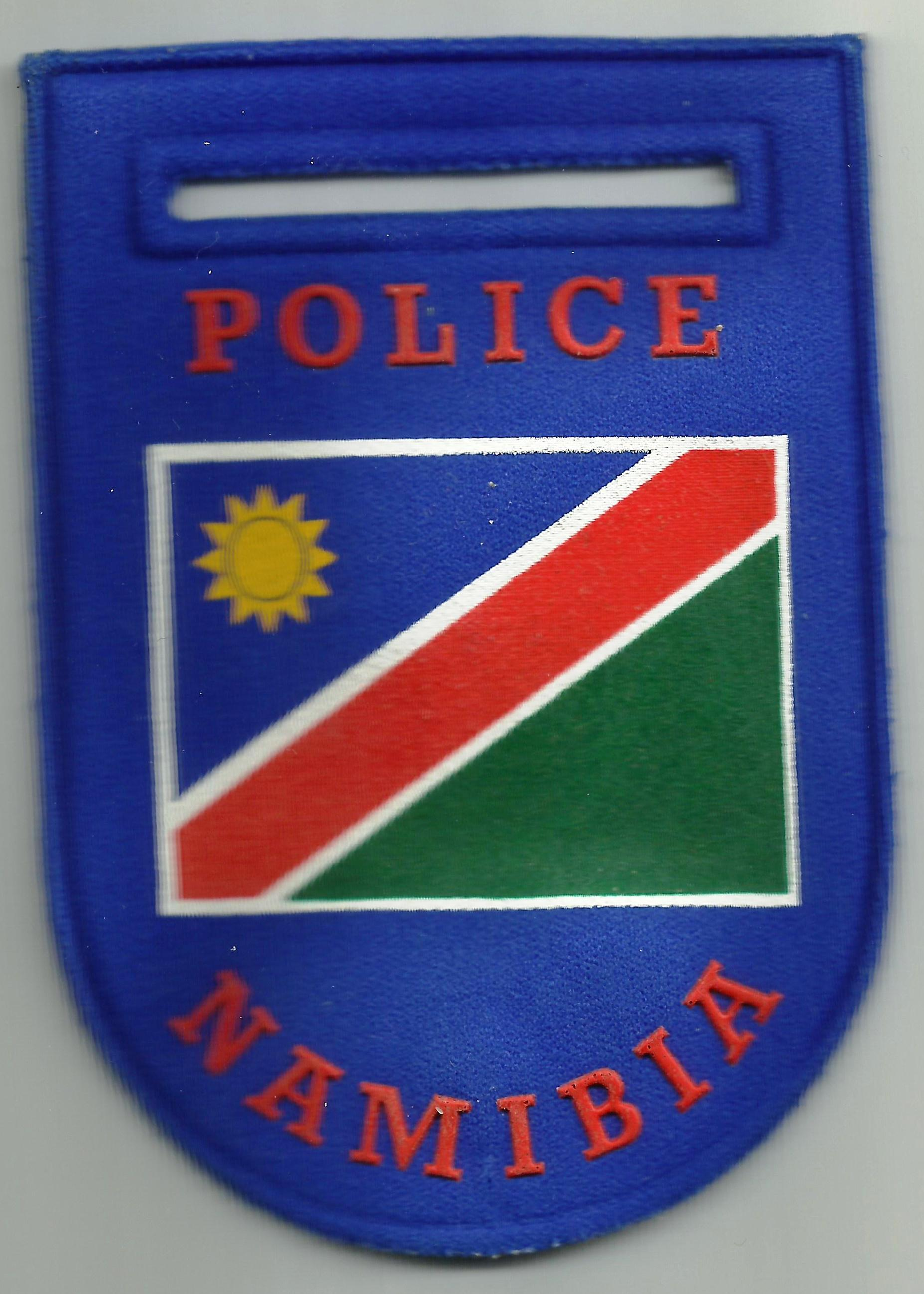 Politie embleem Namibië